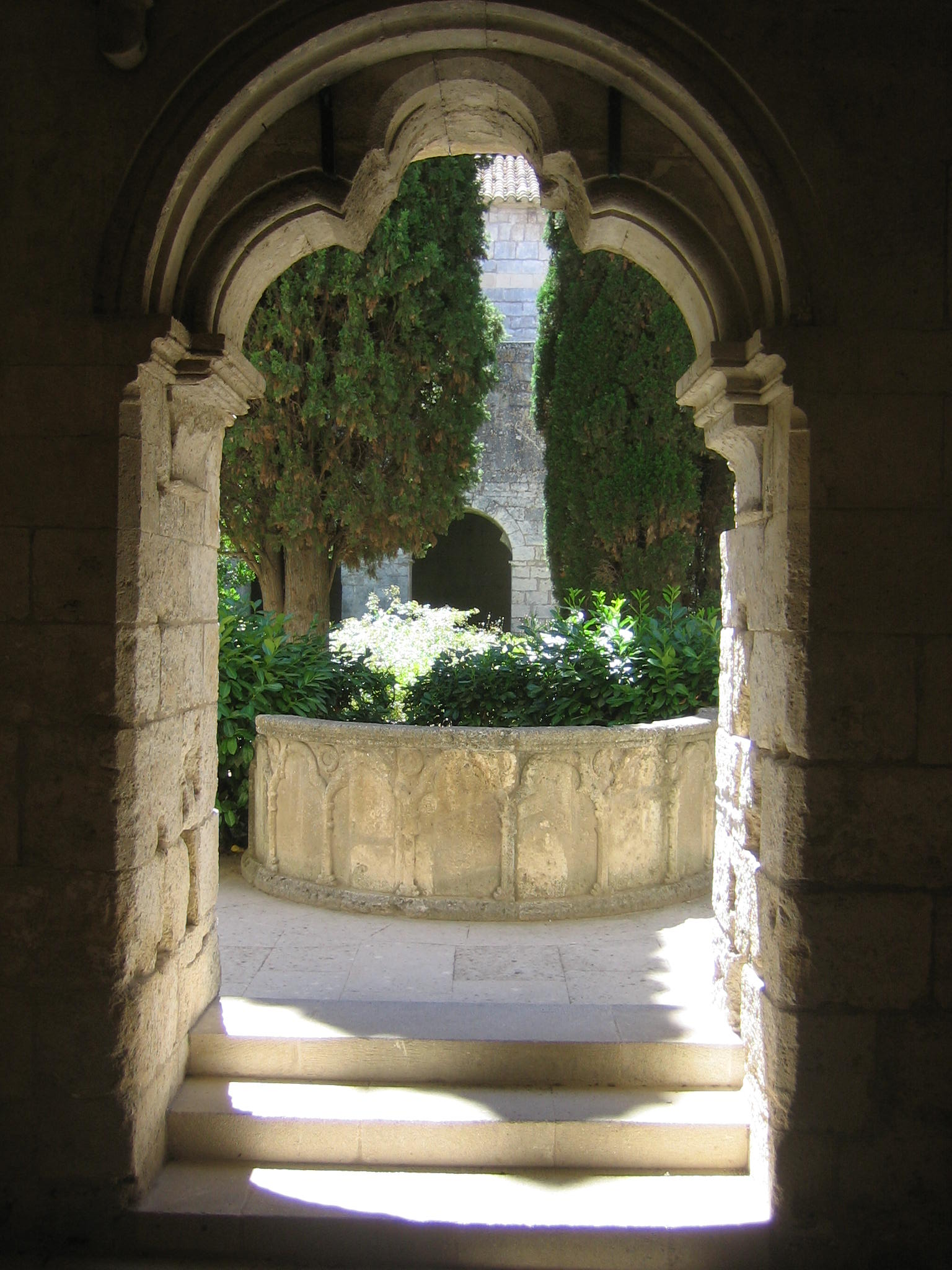 Kreuzgang des Klosters Silvacane in der Provence/Frankreich